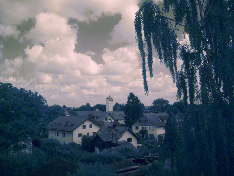 720nm-es infraszűrővel és hatékony infratükröt tartalmazó fényképezőgéppel (Panasonic FZ30) készült, infravörös jellemzőket gyakorlatilag nem mutató fénykép. Az ilyen fényképezőgépeket csak átalakítva lehet infrafotózásra használni (helyszín: Unterhaching, Németország)